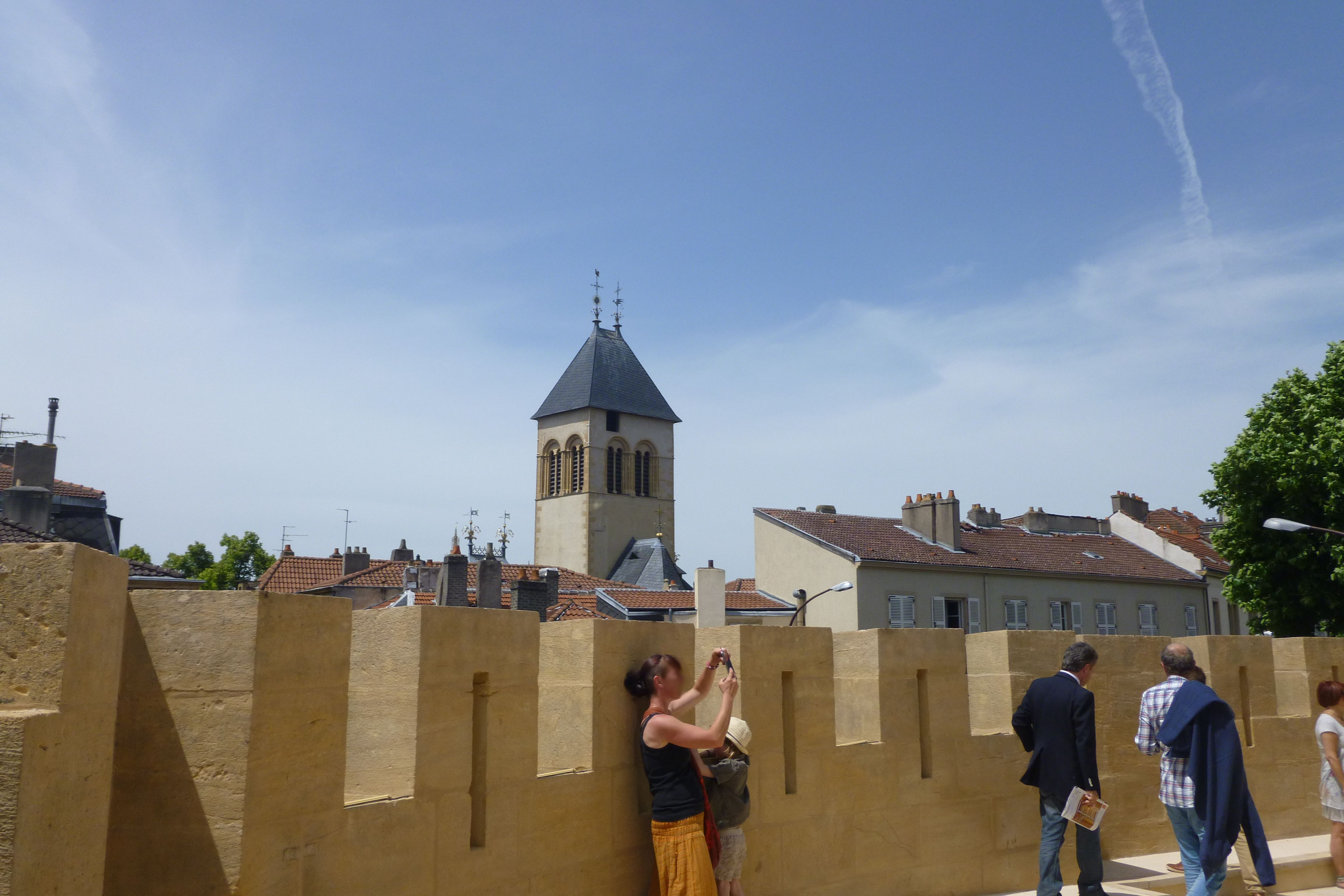 Vue sur l'église Sant-Eucaire et le quartier Outre-Seille depuis la terrasse de la porte des Allemands à Metz (Lorraine)